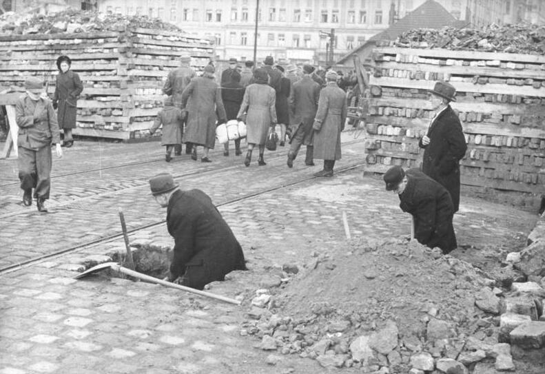 Berlin, Bau einer Panzersperre Scherl: ADN-ZB/Archiv Das faschistische Deutschland im II. Weltkrieg 1939-45 Berlin wird am 1. Februar 1945 zum "Verteidigungsbereich" erklärt. Vor einer Panzersperre am S-Bahnhof Hermannstraße in Neukölln heben Volkssturmsoldaten am 10. März 1945 Gruben für Eisenträger aus. 297-45